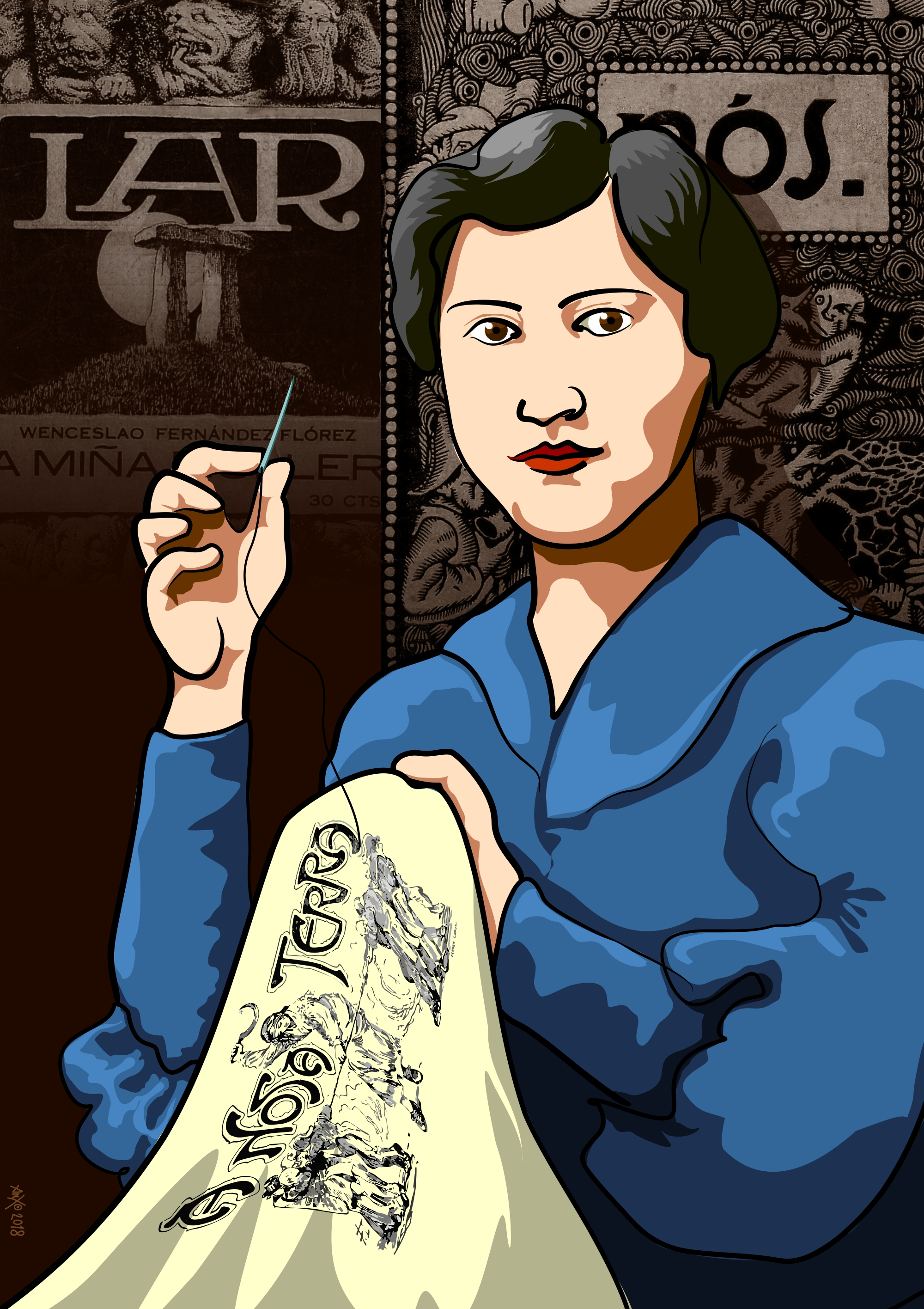 Retrato de María Miramontes